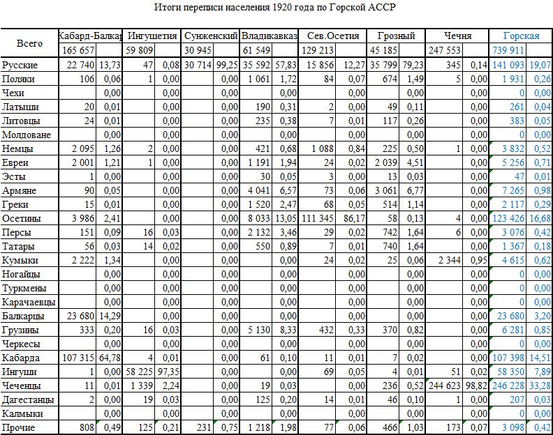 Этнический состав населения Горской АССР по переписи 1920 года